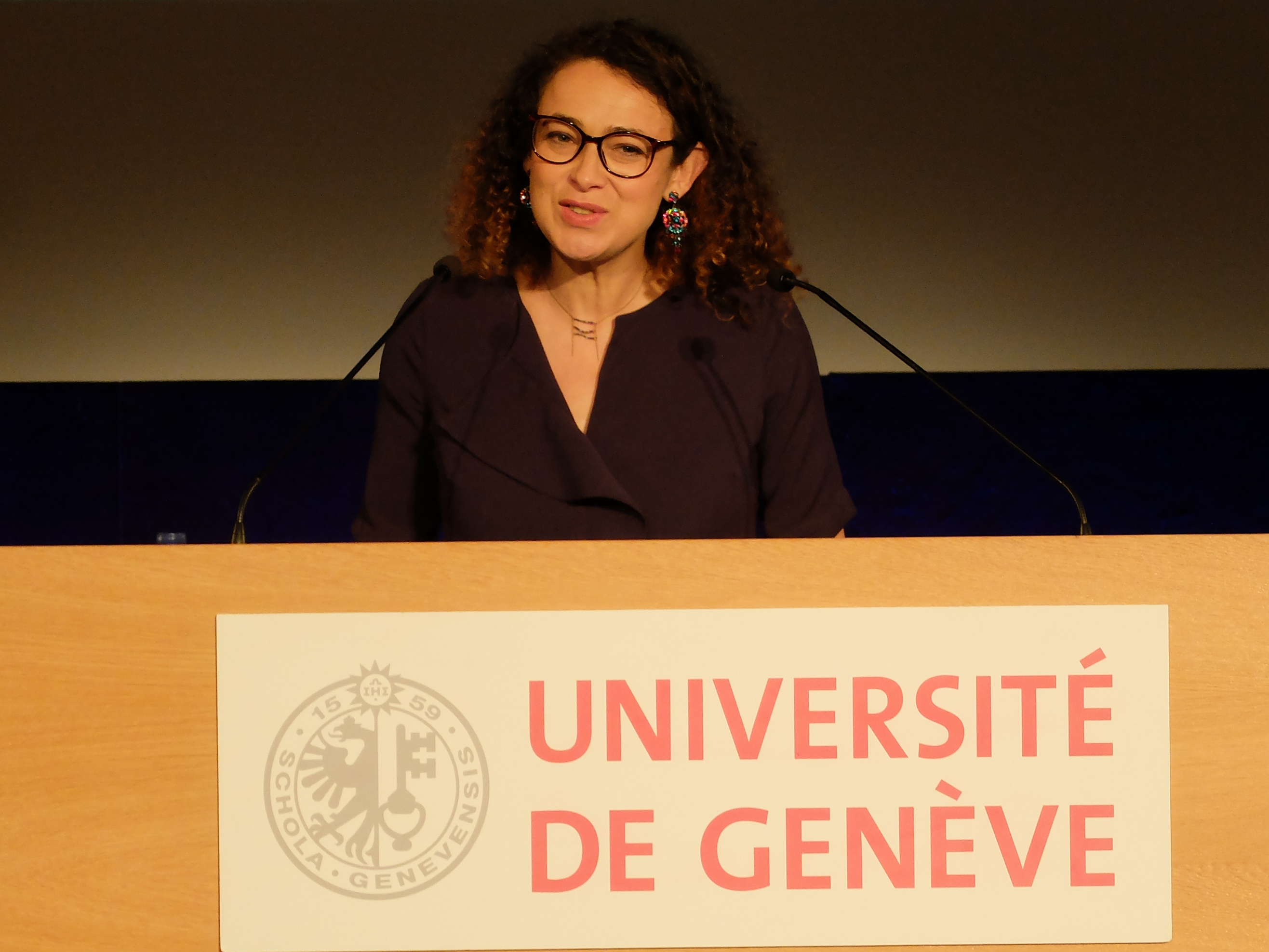 Delphine Horvilleur à l'Université de Genève- 20 Mai 2019